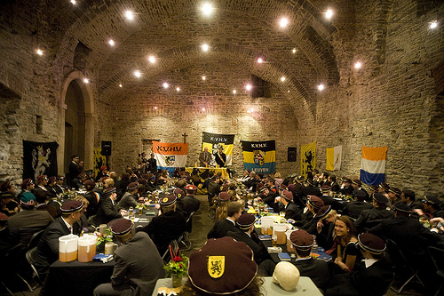 KVHV aan het werk in de ridderzaal van het Gravensteen tijdens de prestigieuze Uylenspiegelfeesten.